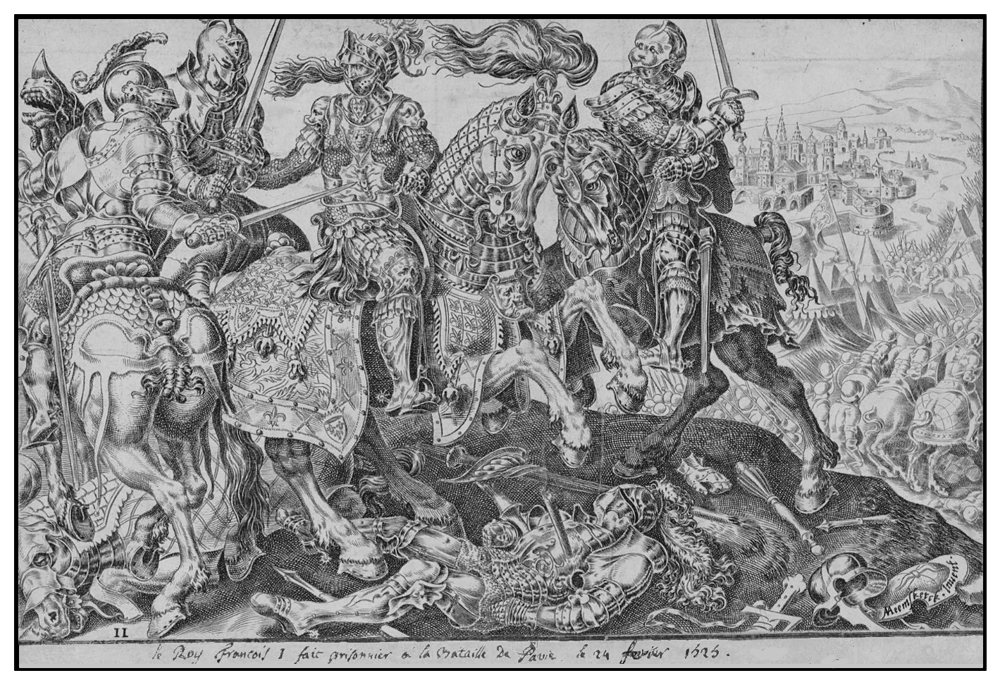 M. Heemskerck.- François Ier fait prisonnier à la bataille de Pavie, contre Charles Quint, 24 février 1525.